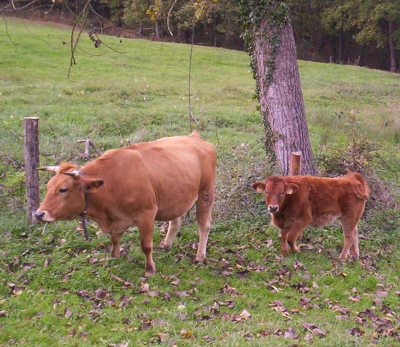 Vaca Asturiana de los Valles y ternero